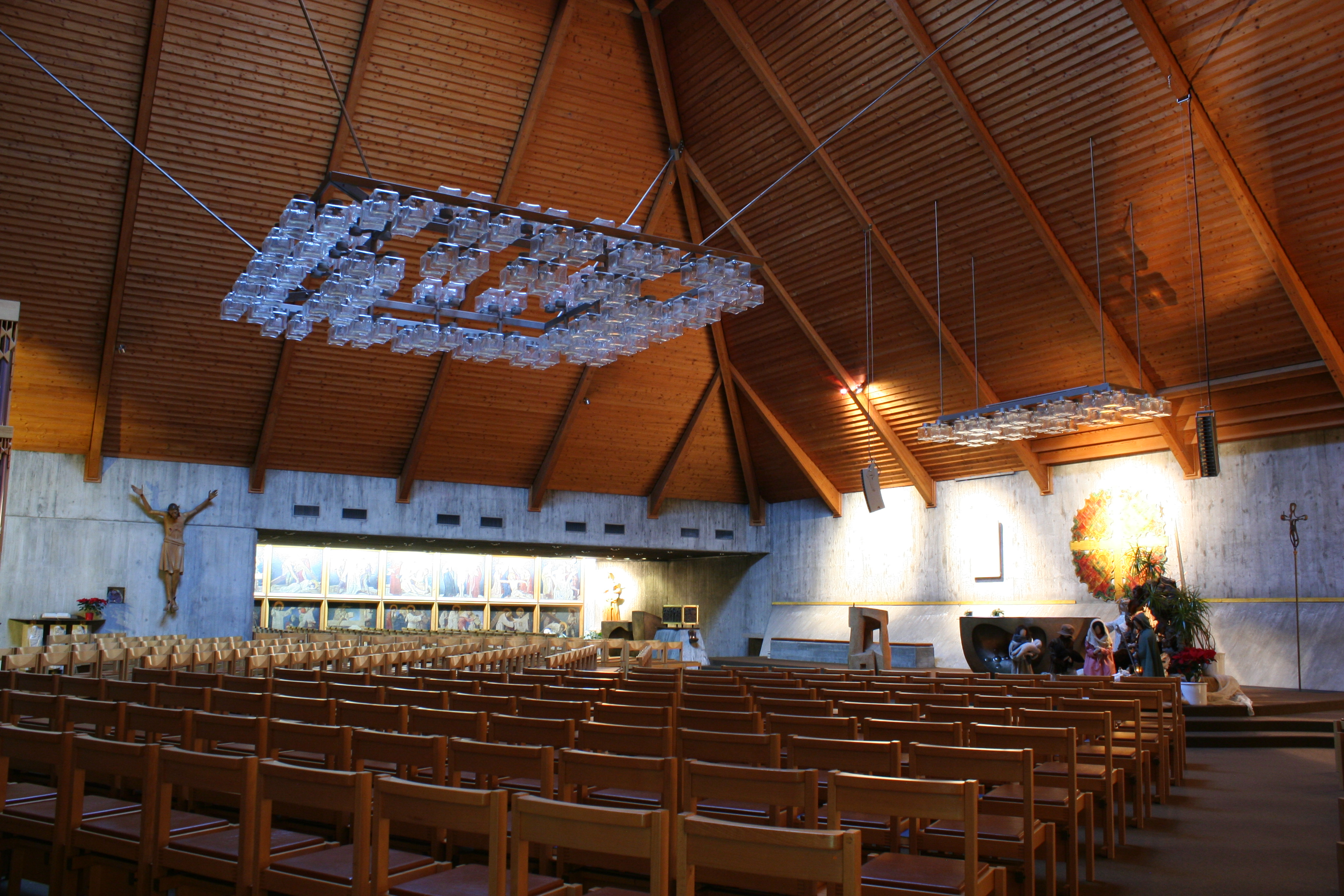 Römisch-katholische Pfarrkirche Heilig Kreuz (Zürich-Altstetten), Innenaufnahme 2013